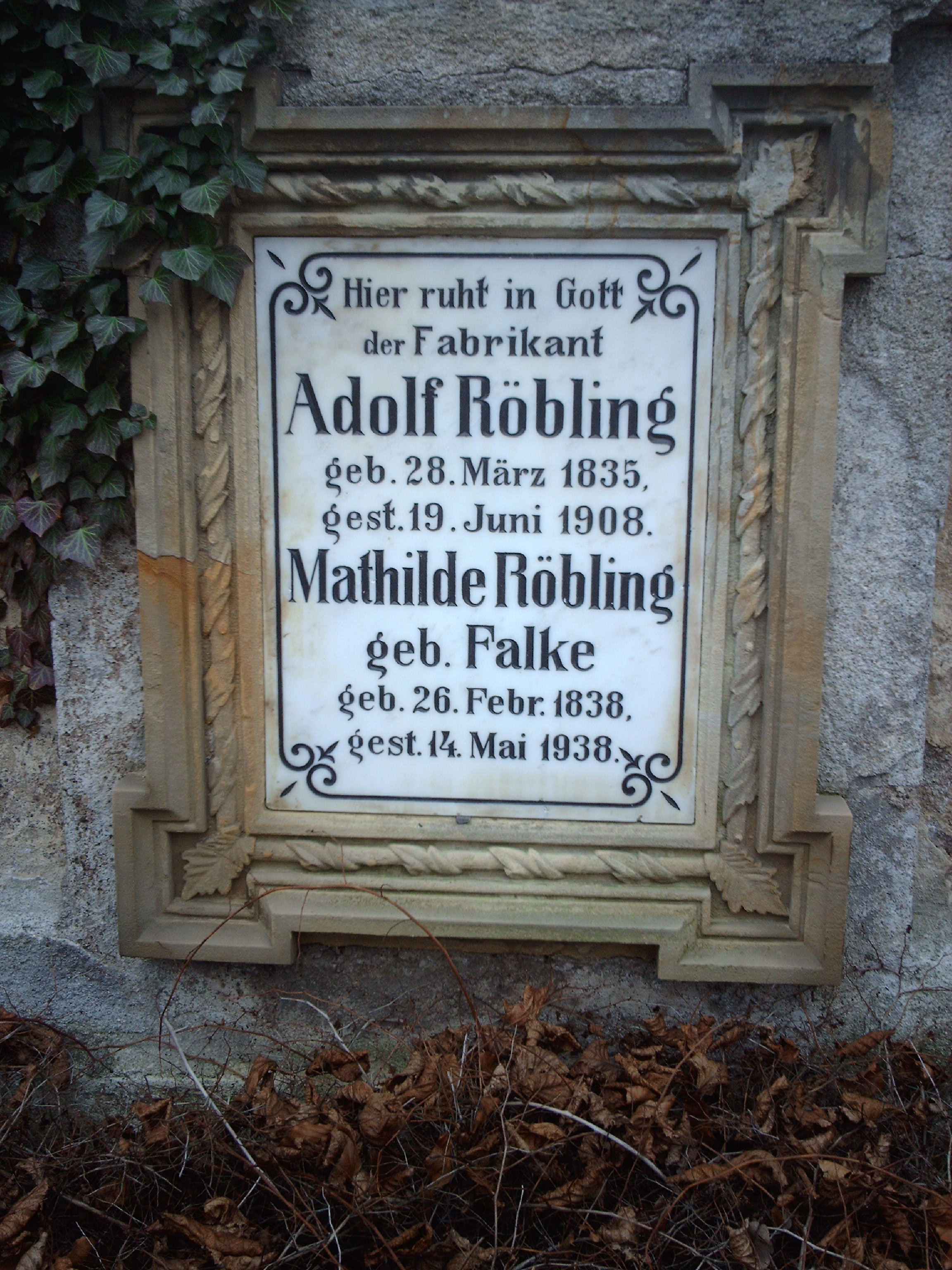 Grabmal des Fabrikanten Adolf Röbling am Hauptfriedhof in Arnstadt.